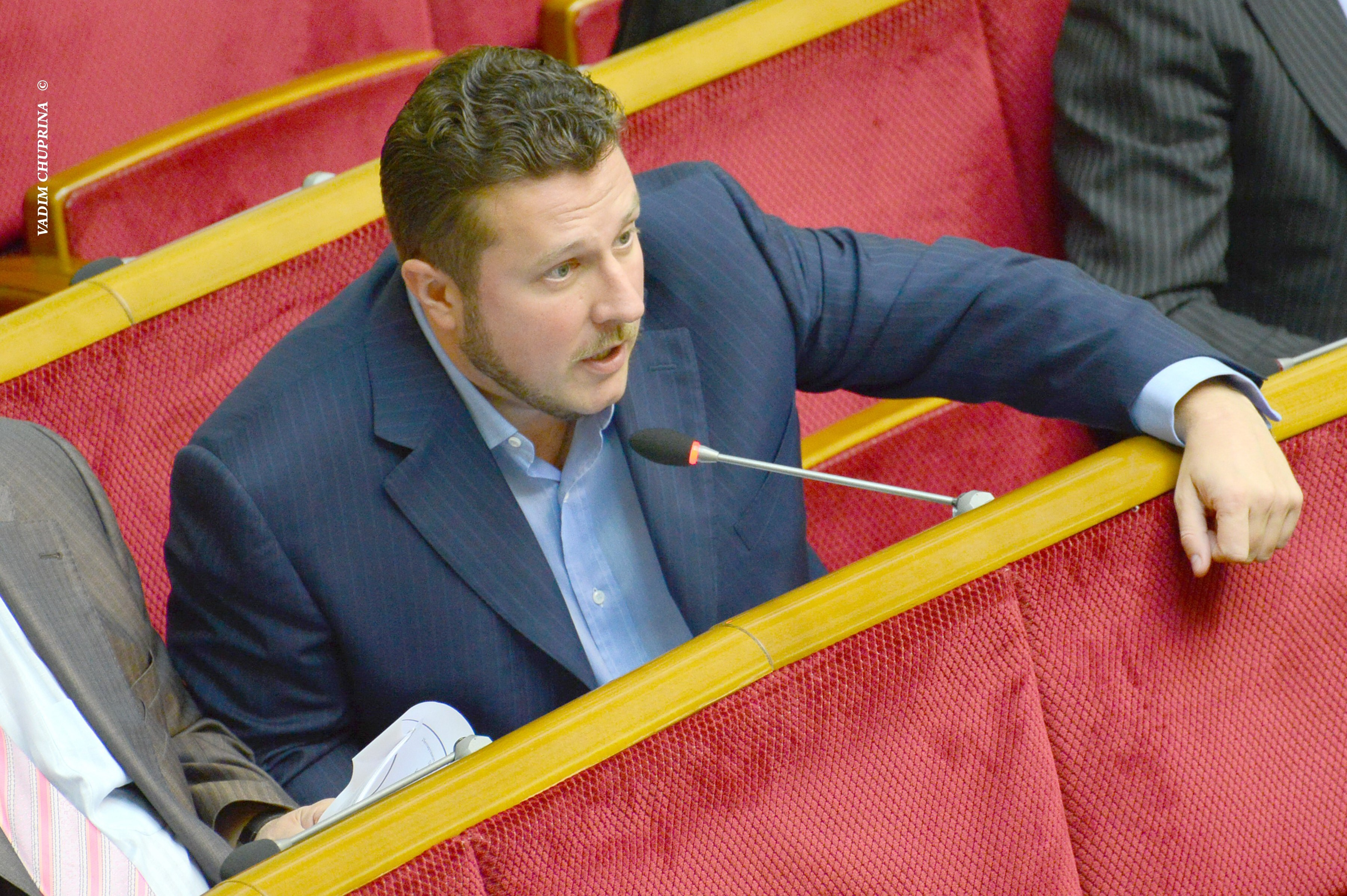 ВЕРХОВНА РАДА УКРАЇНИ 2013 , фото Вадим Чуприна